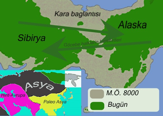 Kaynak: Kendim yaptım